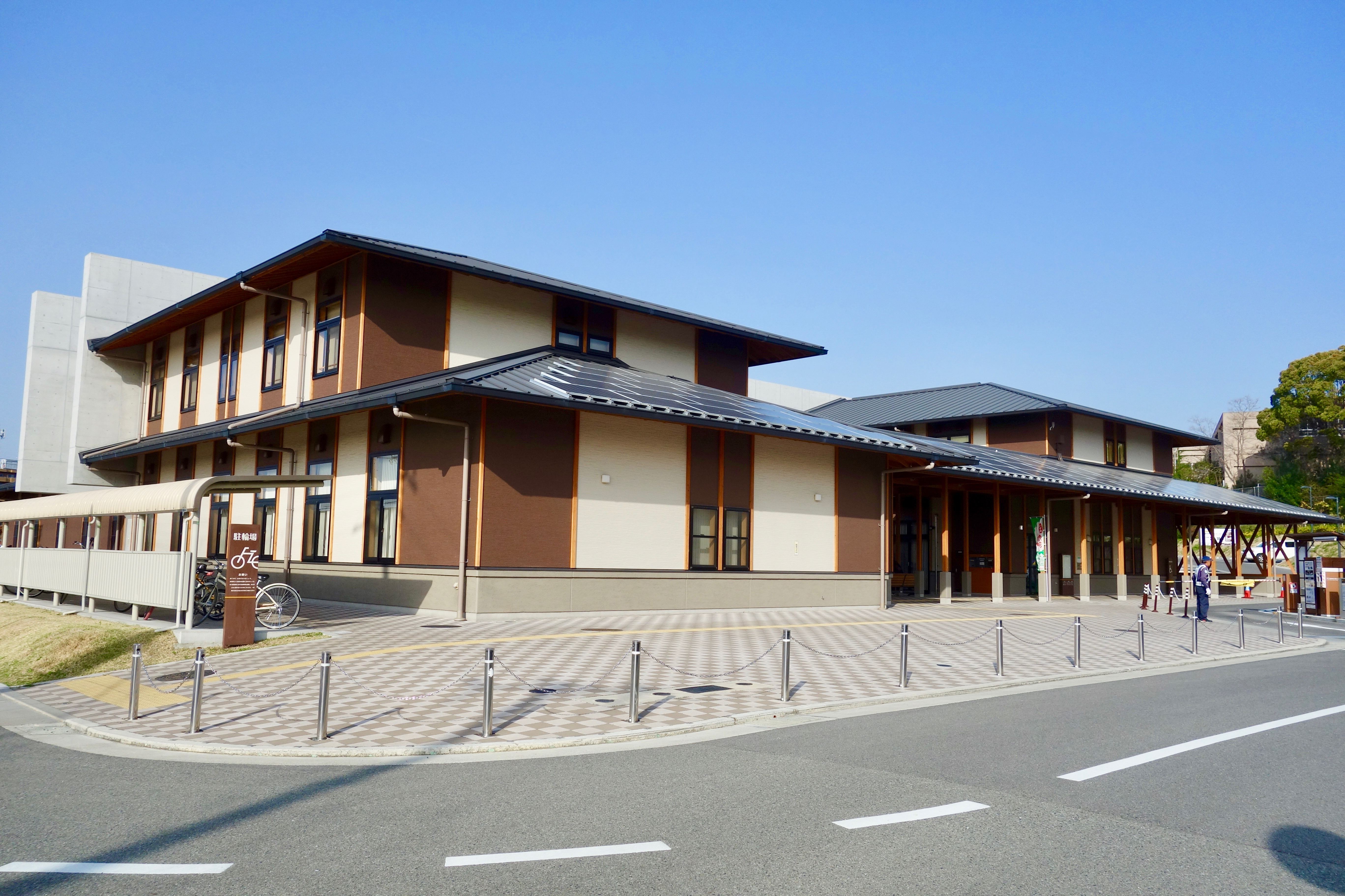 北部リージョンセンター